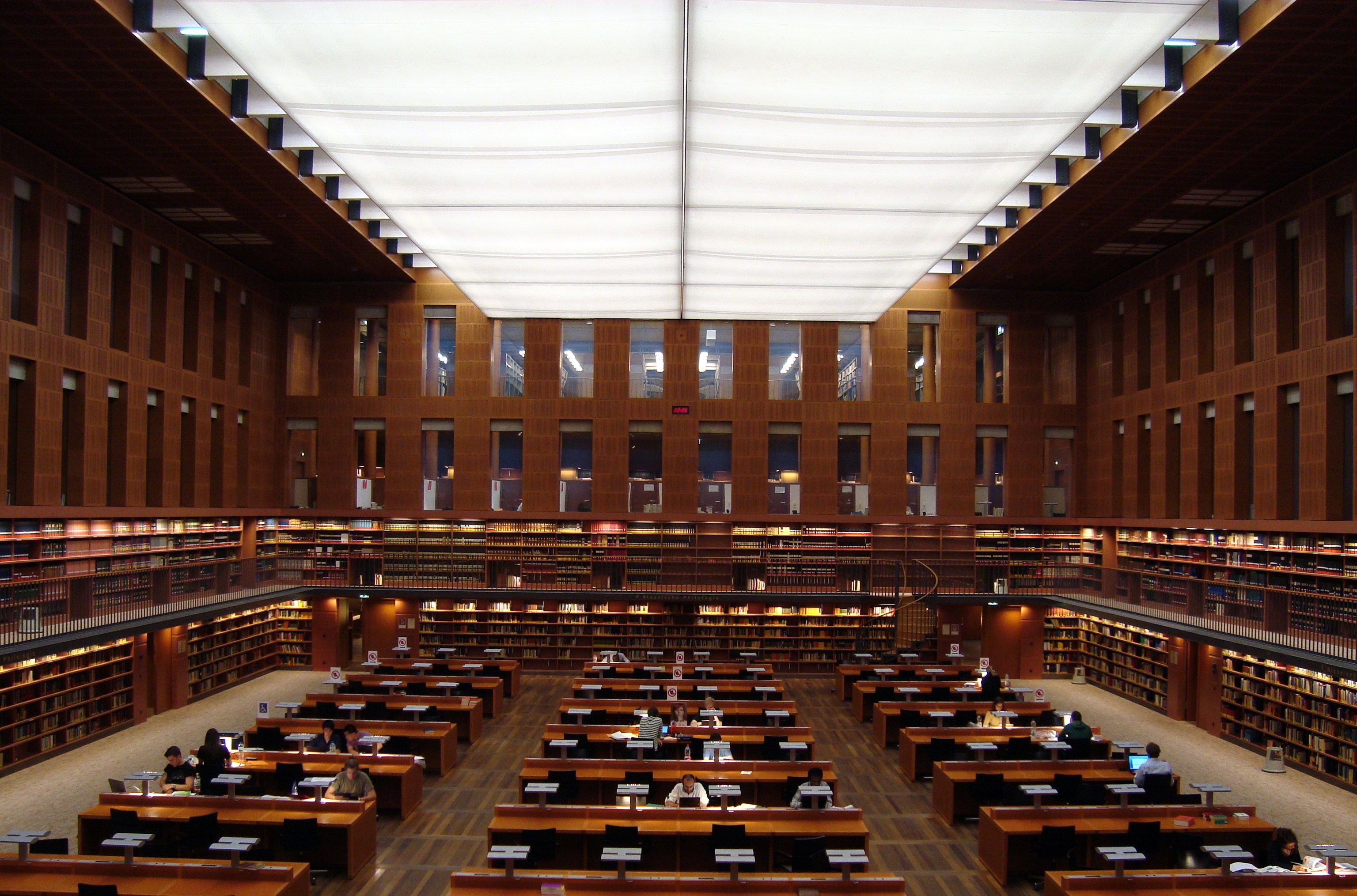 SLUB Dresden reading room at night (Zentralpunkt Zellescher WEG 18/ Central-Point Zellescher WEG 18).